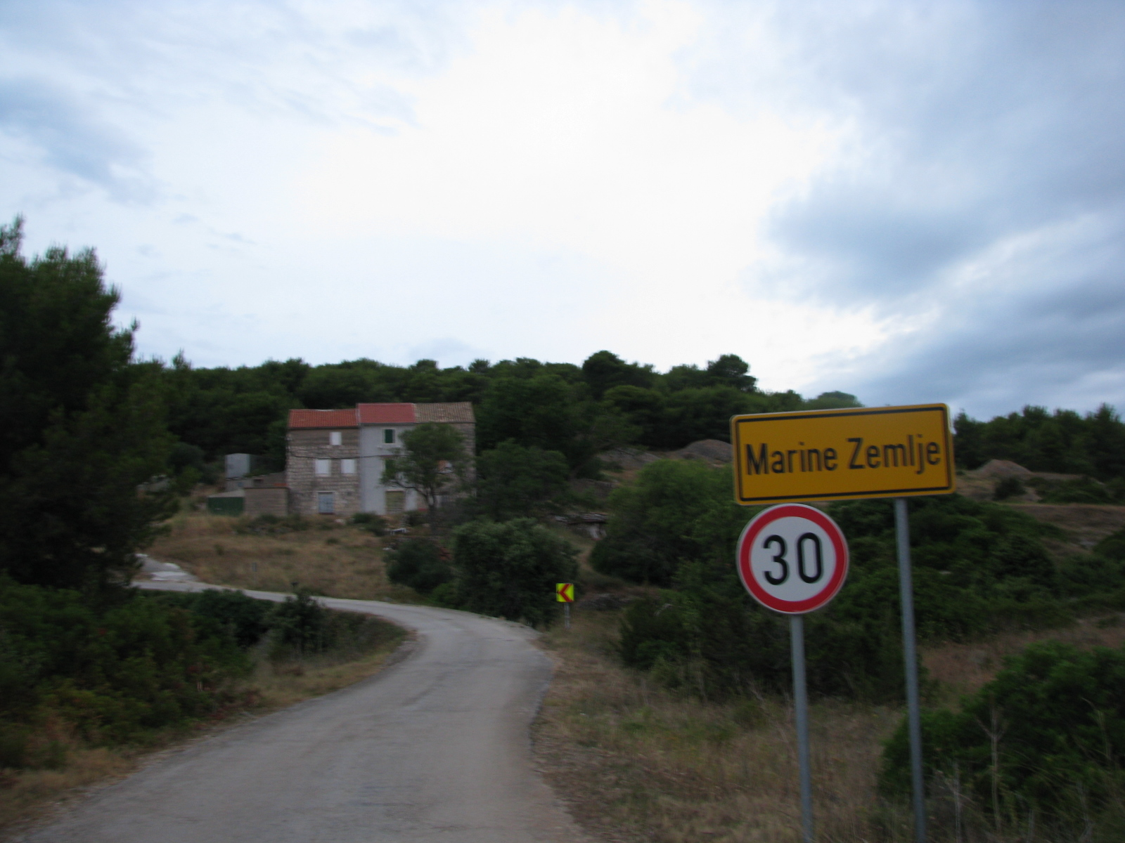 Ulaz u naselje Marine Zemlje na otoku Visu